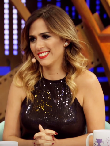 Werneck em 2017